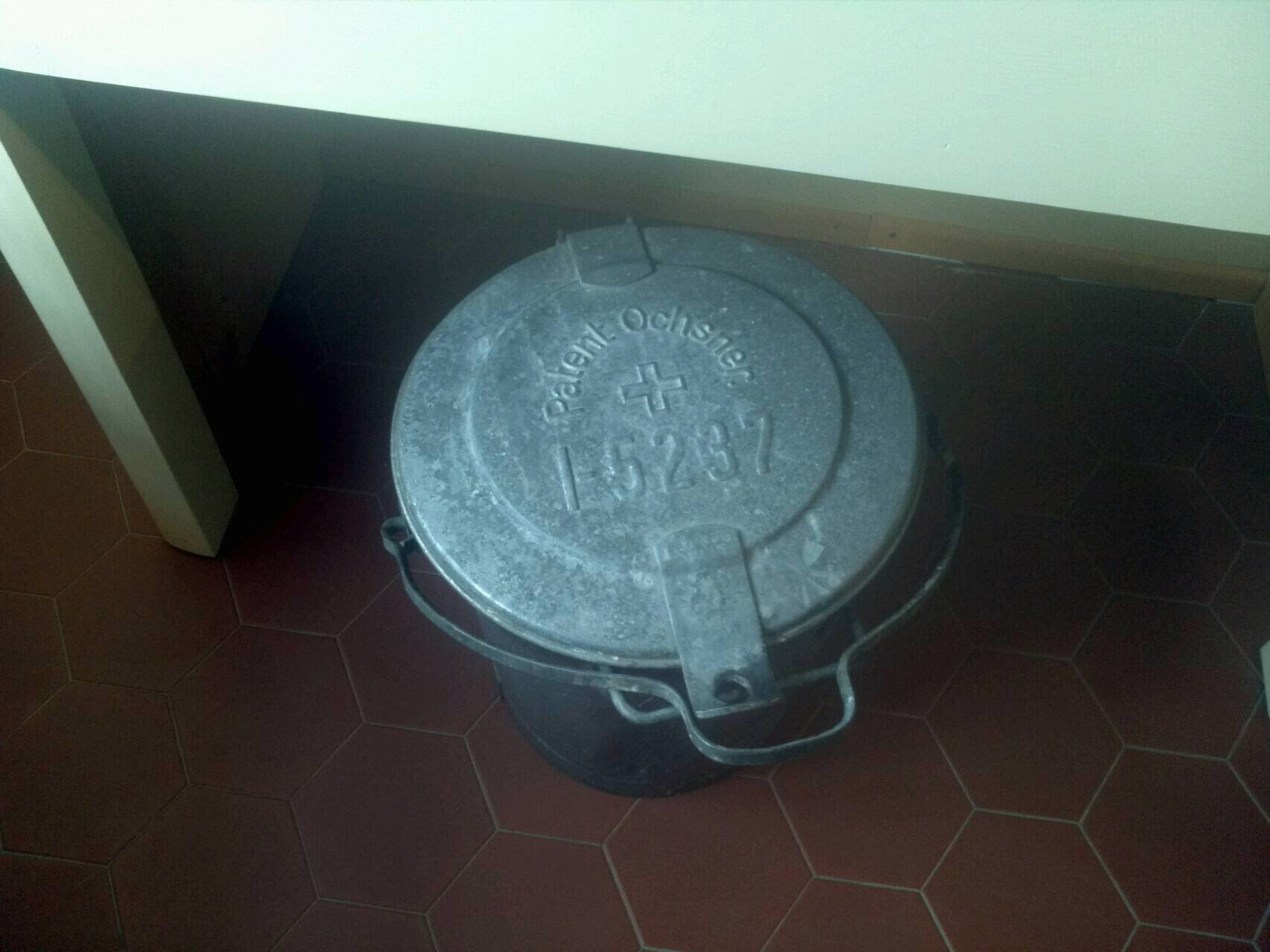 Ochsner Abfalleimer, Historisches Museum Baden